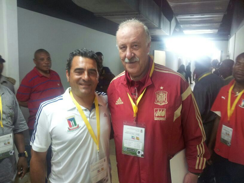 Esteban Becker, entrenador de la selección femenina de fútbol de Guinea Ecuatorial y Vicente del Bosque, entrenador de la selección de fútbol de España.